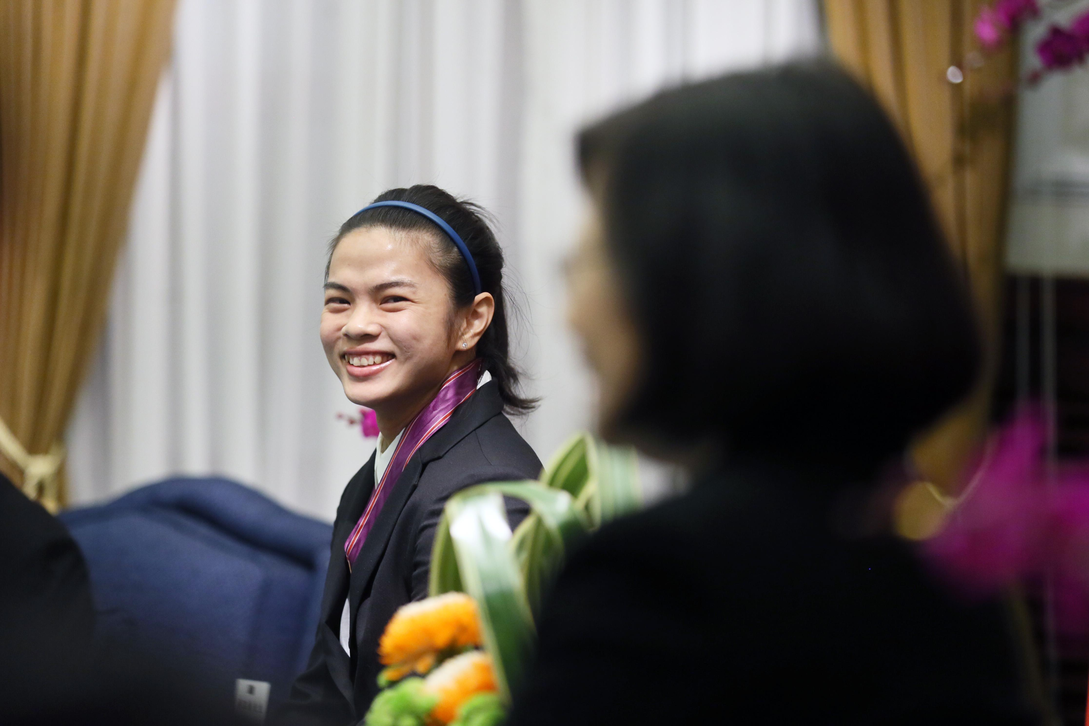 中華民國總統蔡英文在頒授舉重國手許淑淨四等景星勳章後和許淑淨談話，了解當前國家體育現況及選手需求。